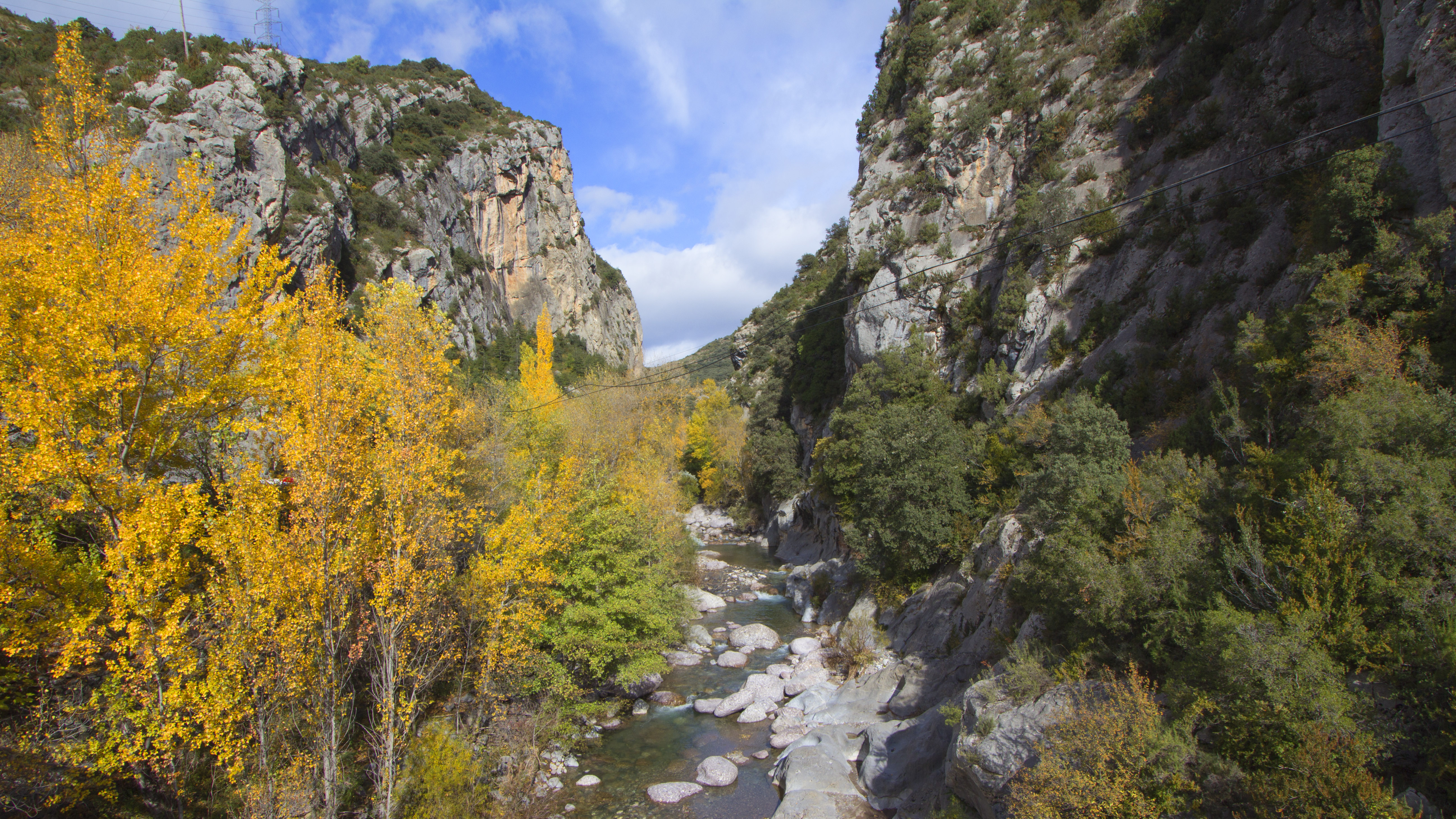 Congost d'Erinyà (Pallars Jussà)